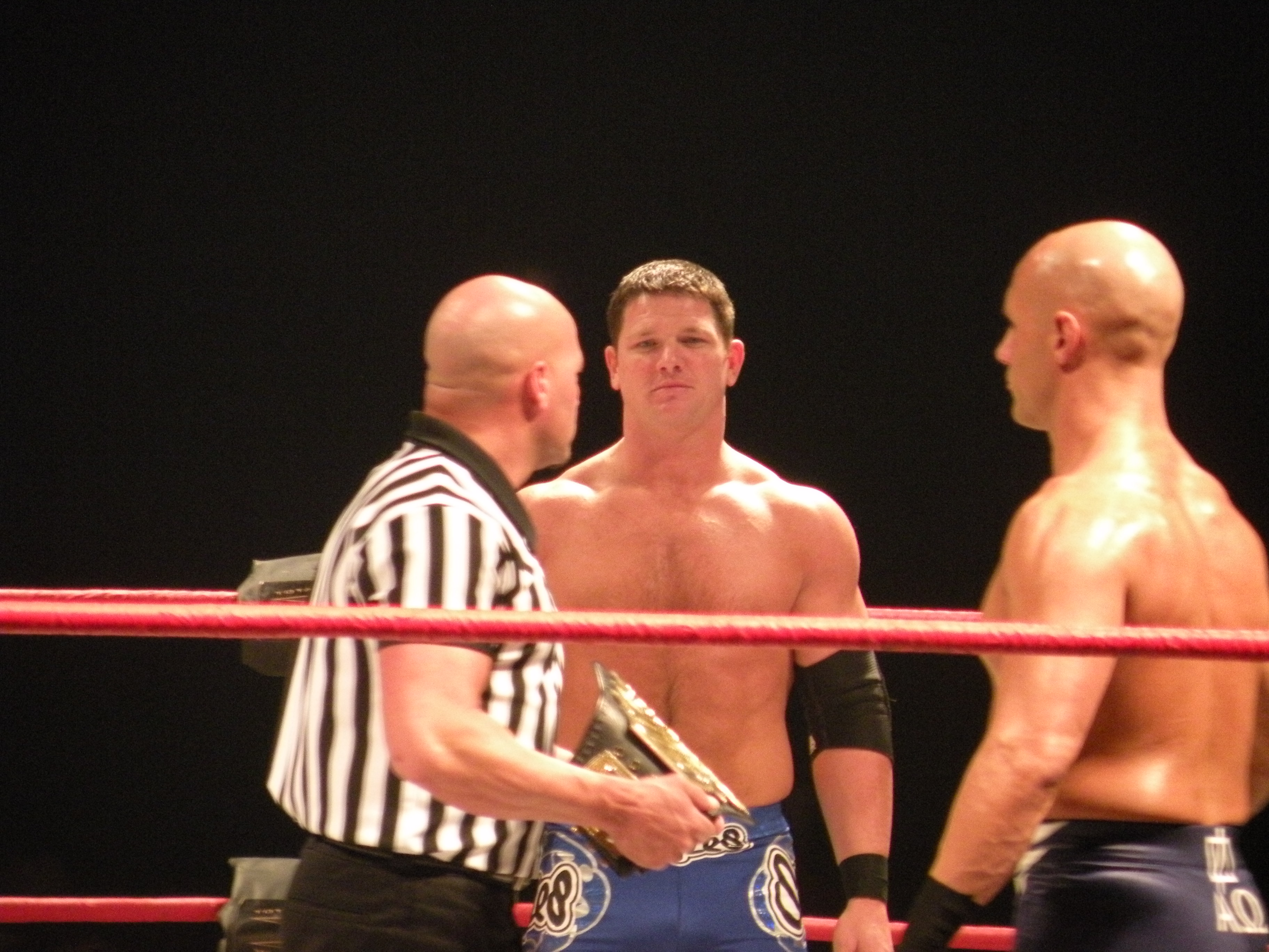 A.J. Styles tna zenith paris